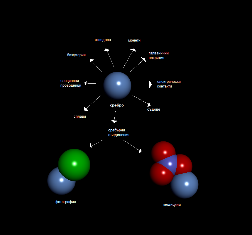 Приложение на среброто